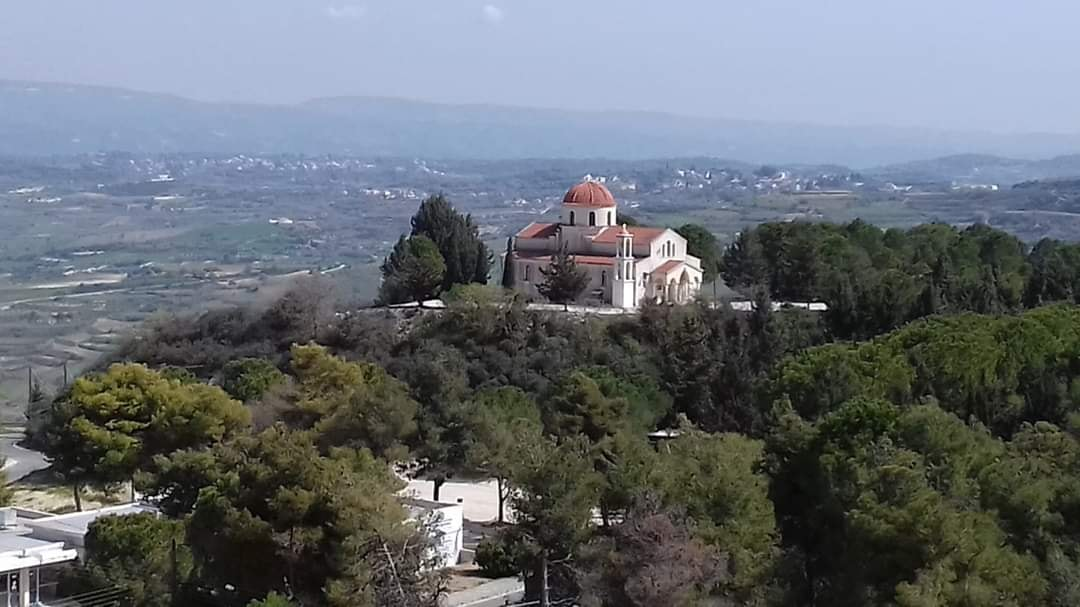 Εκκλησία Θελέτρας- Παναγιά Χρυσελεούσα (Θελετροφυλάκτρια)